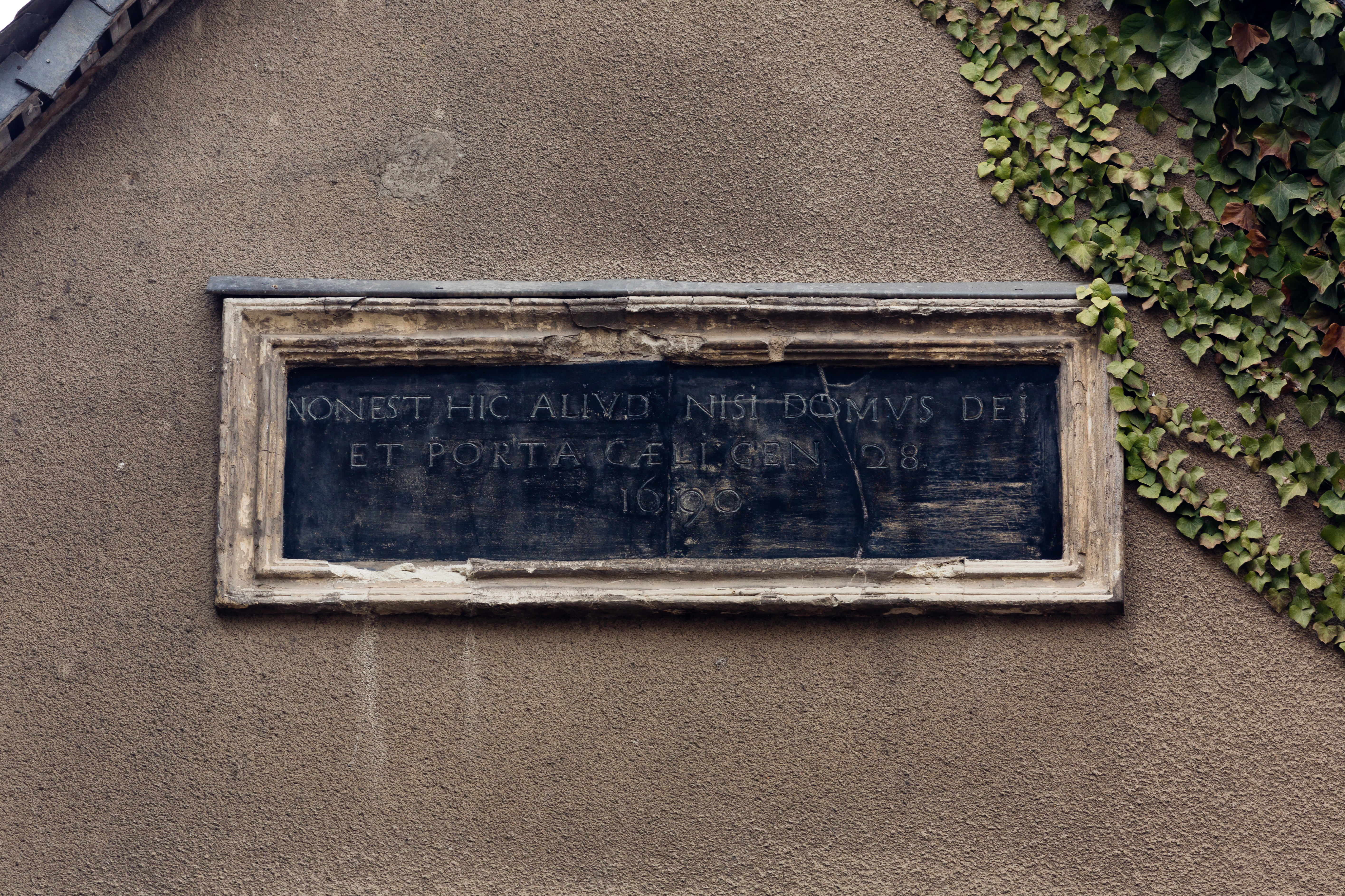 Inscription sur le pignon sud de l'ancien jeu de paume, devenu chapelle, rue Saint-Louis à Rennes (France). center: Non est hic aliud nisi domus dei et porta cæli. Gen 28. 1690 [This is none other than the house of God, and this is the gate of heaven. Genesis 28. 1690]